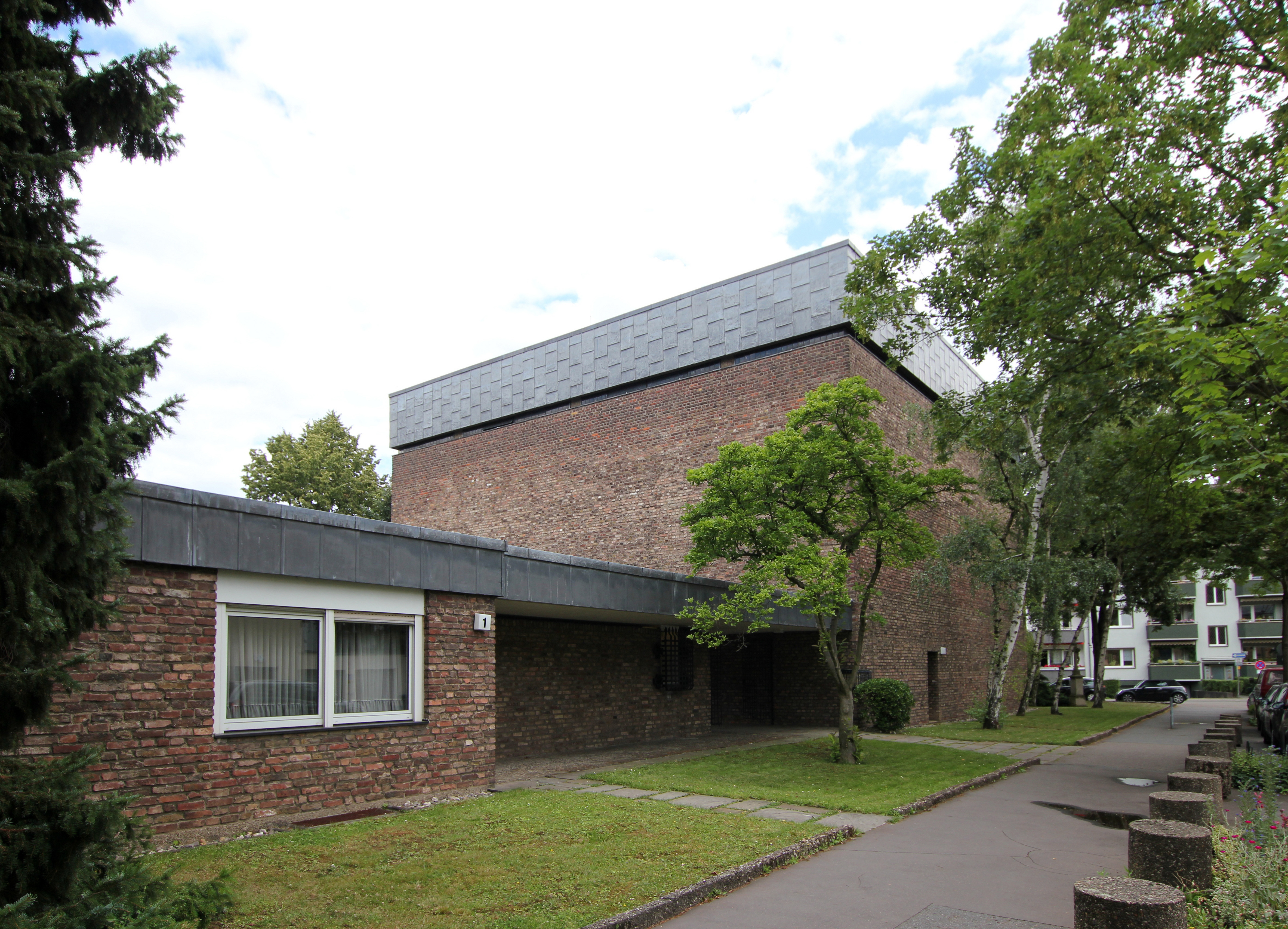 Köln-Lindenthal, An St. Laurentius 1. Pfarrhaus und Kubus der katholischen Kirche St. Laurentius, Architekten: Emil Steffann und Gisbert Hülsmann, erbaut 1961